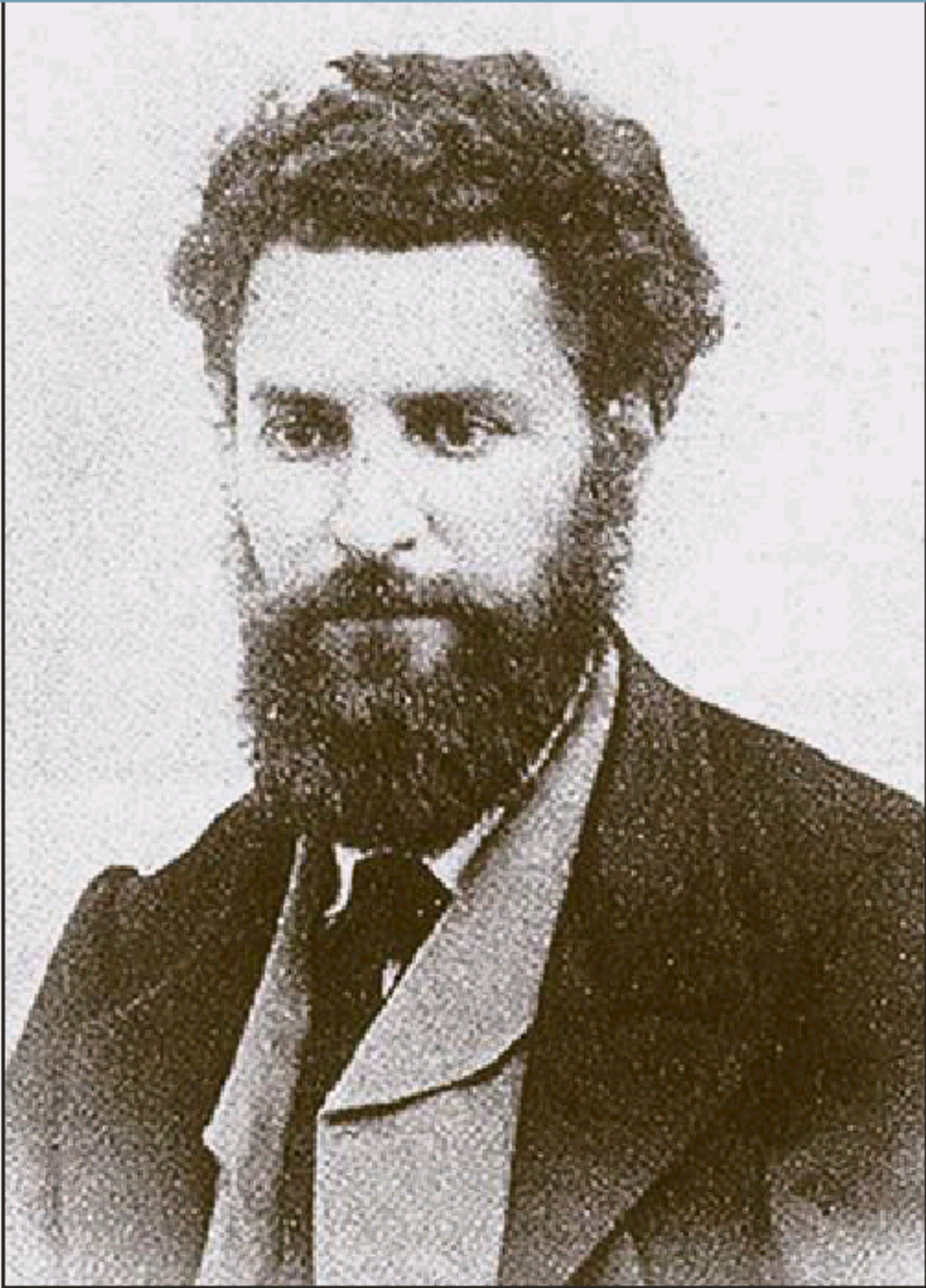 Hugo (Ugo) Schiff (* 26. April 1834 in Frankfurt am Main; † 8. September 1915 in Florenz)